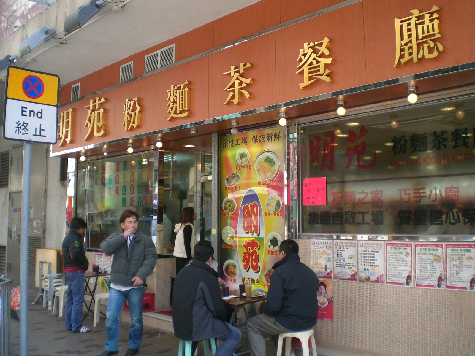 深水埗元州街茶餐廳明苑粉麵荼餐廳